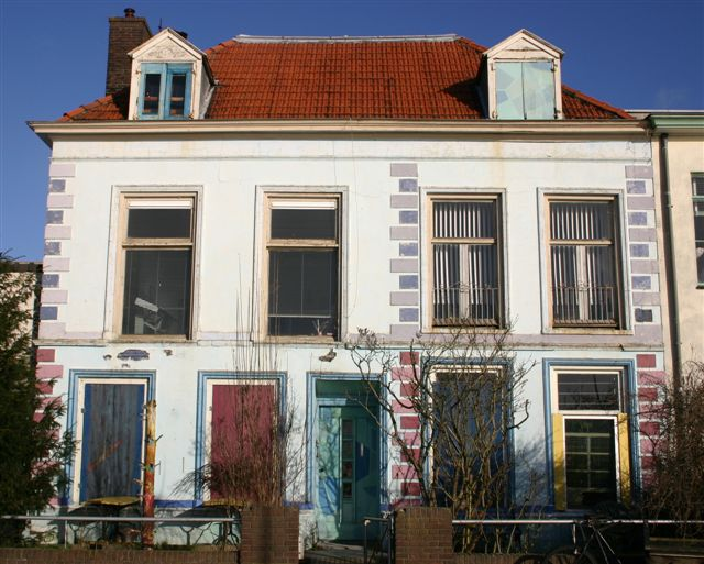 Eigen Makelij 2007. Bij gebruik, bron (Wikipedia) en fotograaf (T.C. Nijeholt) vermelden.